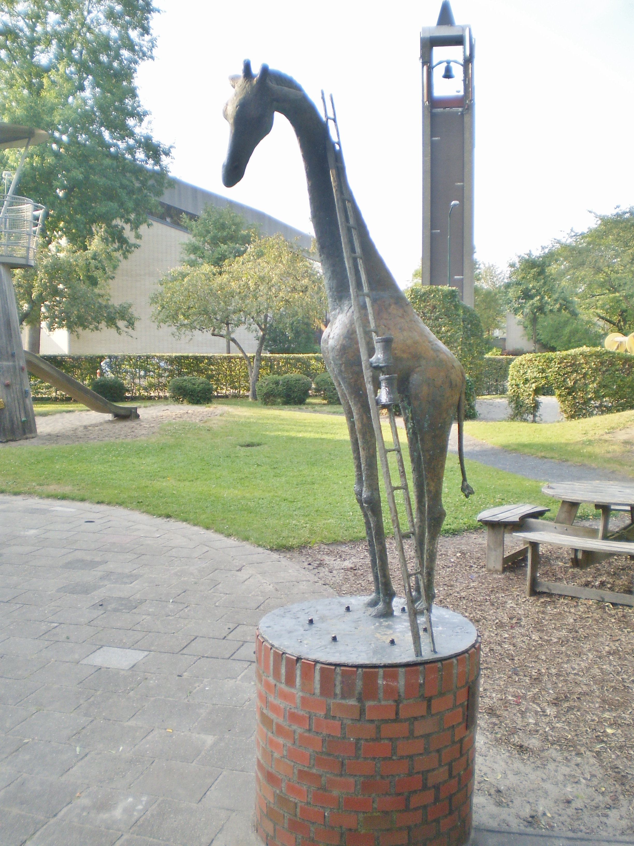 Beeld bij kinderopvang 'De Kleine Stad'